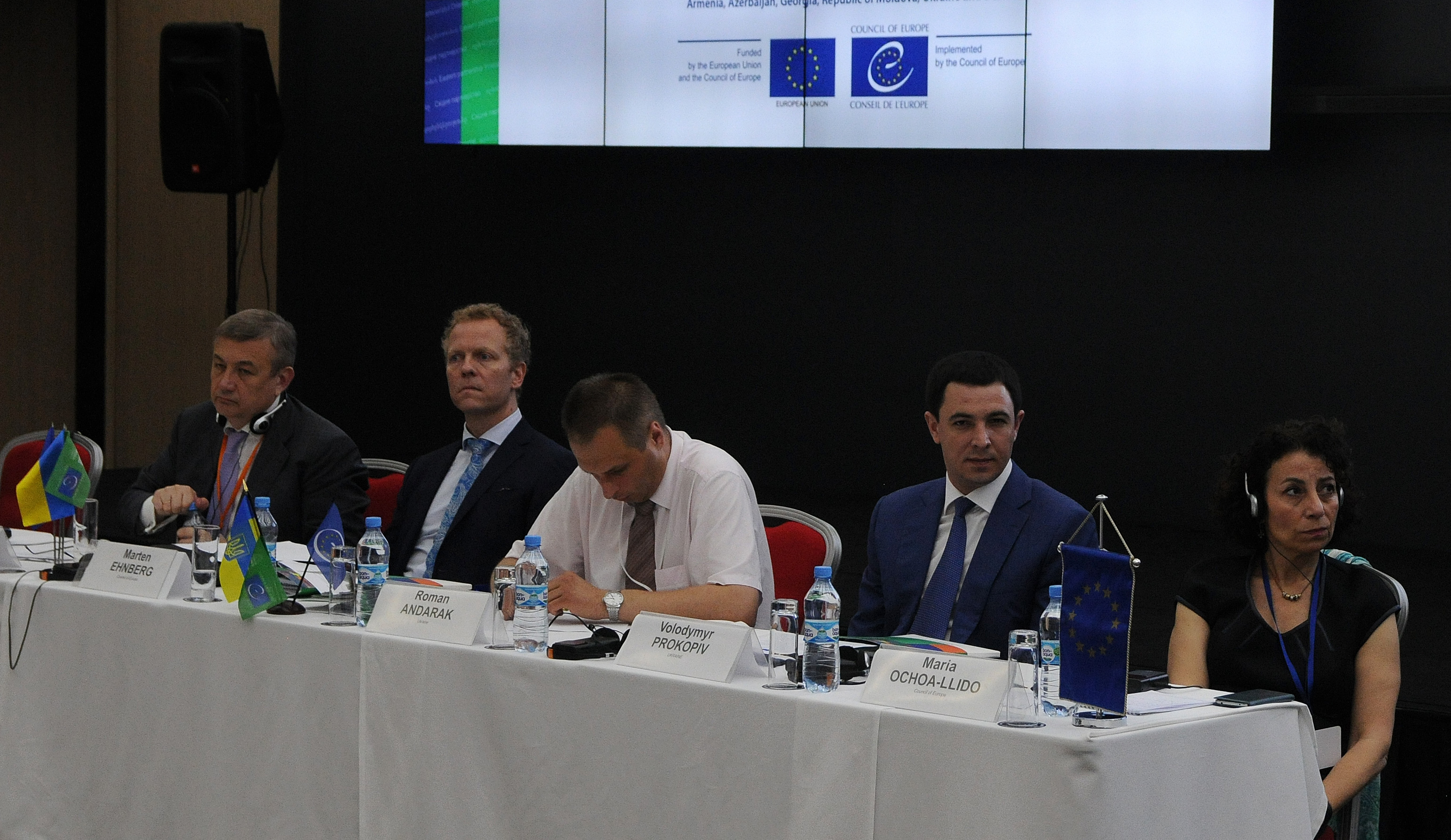 Володимир Прокопів на семінарі Конгресу місцевих та регіональних влад Ради Європи (21 червня 2016 року, Київ)